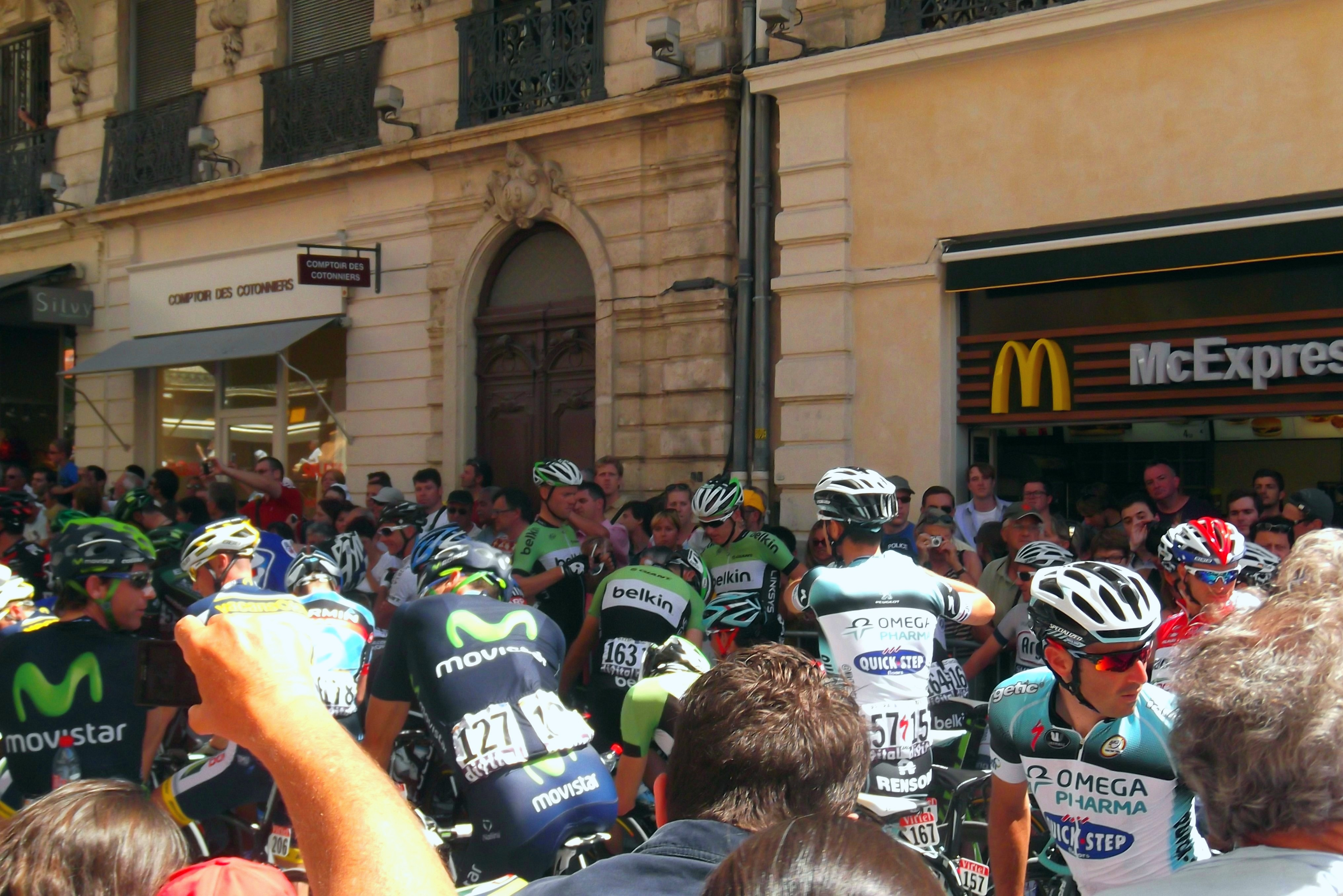 Départ Montpellier, place de la Comédie.